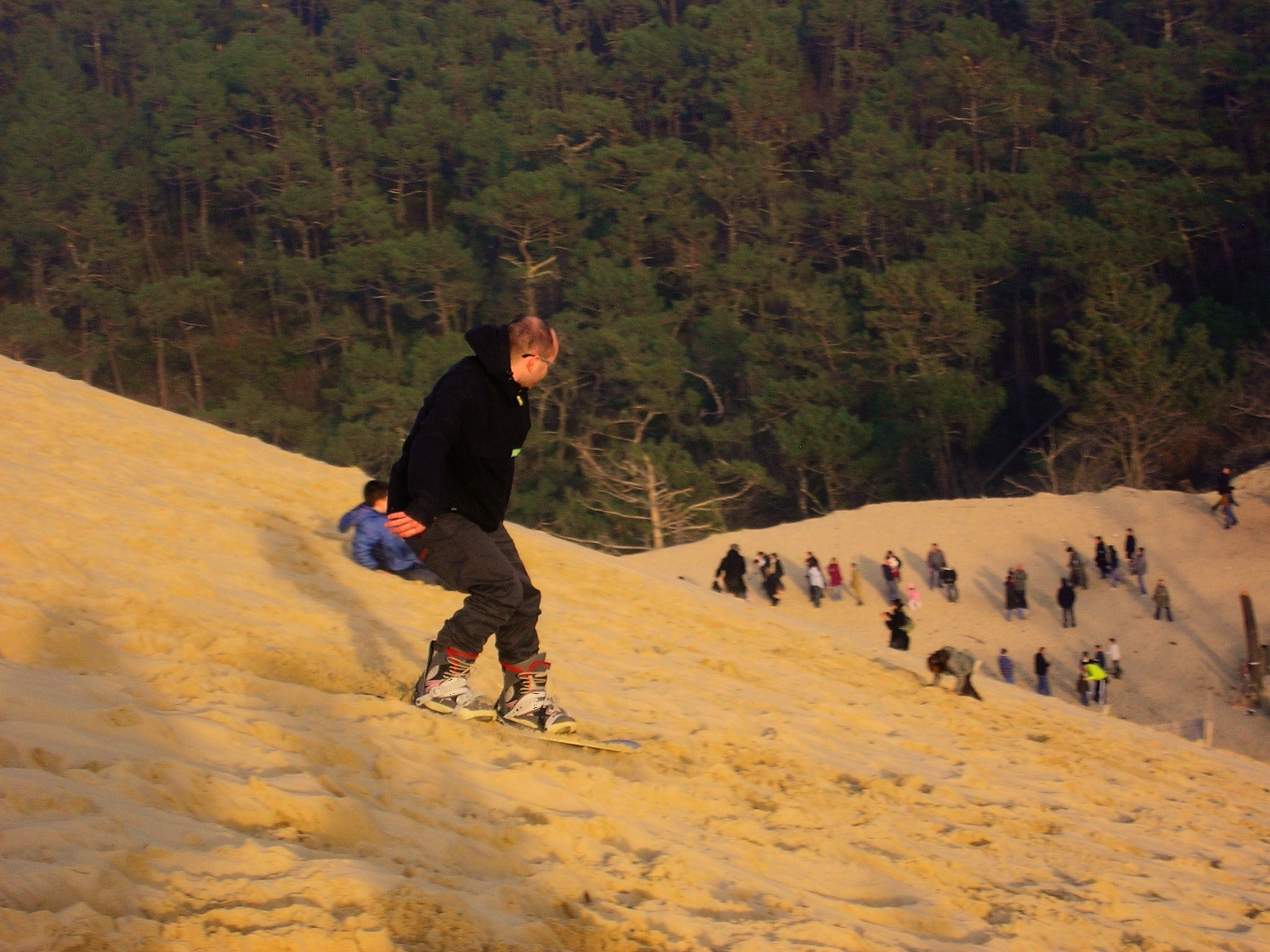 Une personne pratiquant le Sandboard sur la Dune du Pyla ( Bassin d'Arcachon). La dune du Pyla étant la plus haute dune d'Europe.